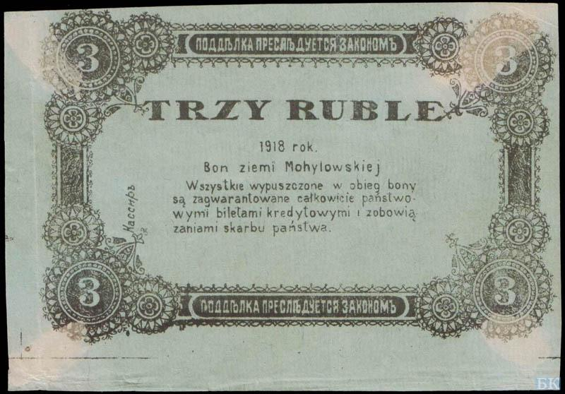 3 рубля Могилевской губернии 1918, реверс. Надпись по-польски